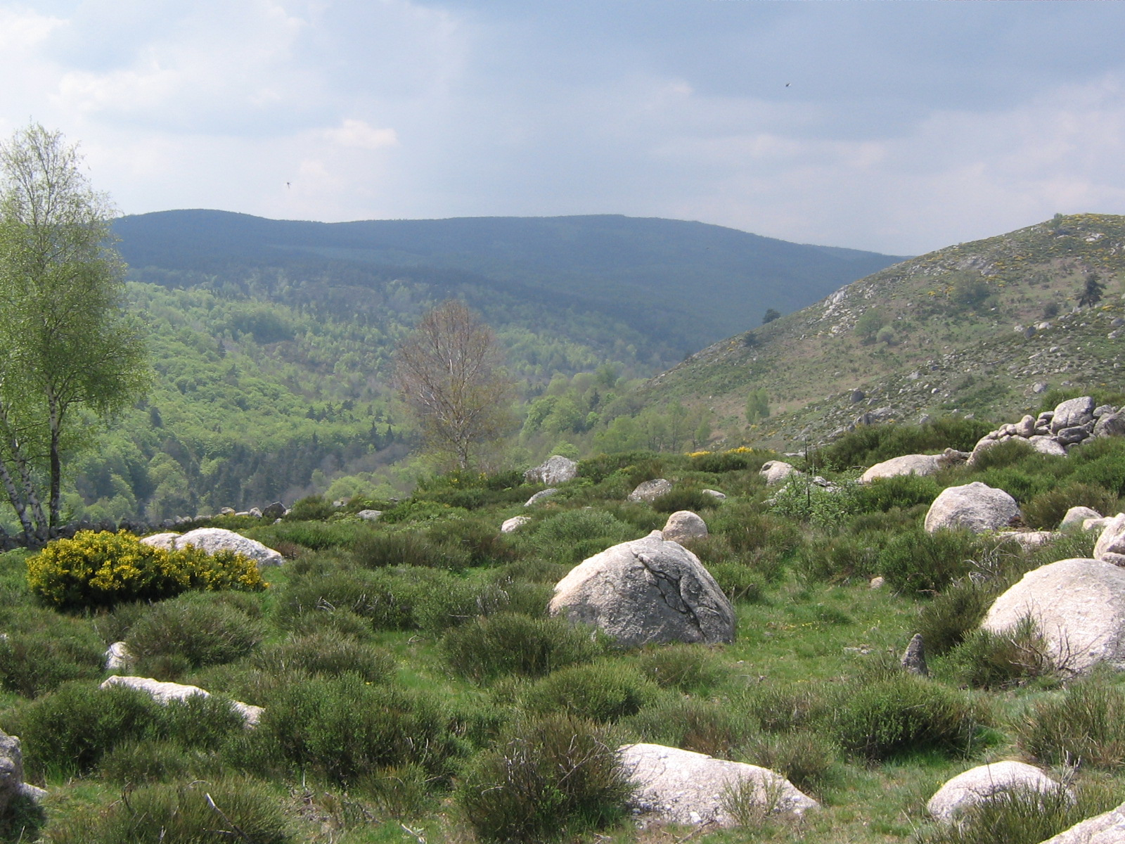 Lande à genêt purgatif sur les contreforts de l'Aubrac (Lozère)